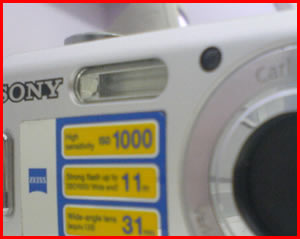 Fotoğraf Makinesi Flaşı